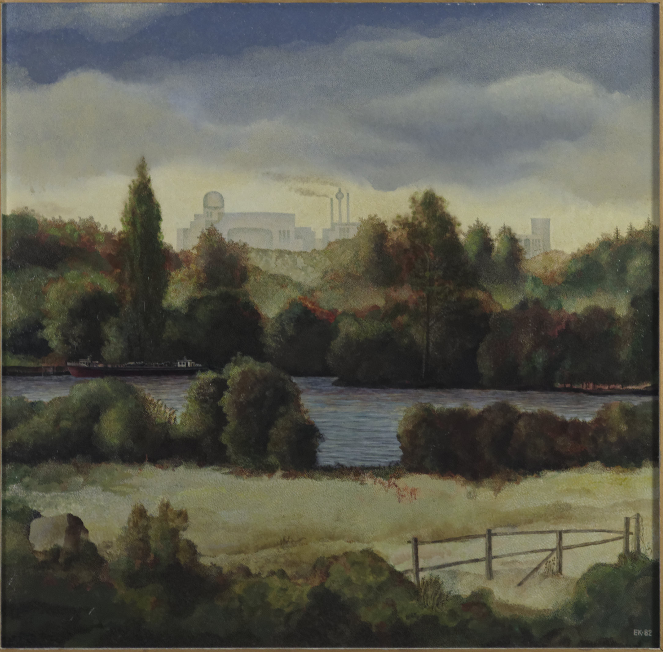 Neckar-Phantasie, Öl auf Karton, 1982 (74 × 73 cm) mit dem Kraftwerk Marbach.